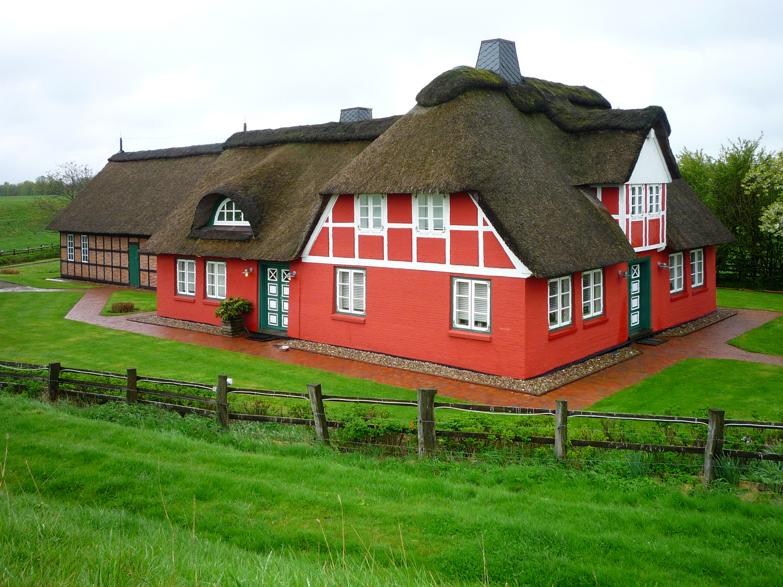 Reetgedecktes Anwesen mit Fachwerkelementen hinter dem Elbdeich bei Wischhafen im Landkreis Stade.